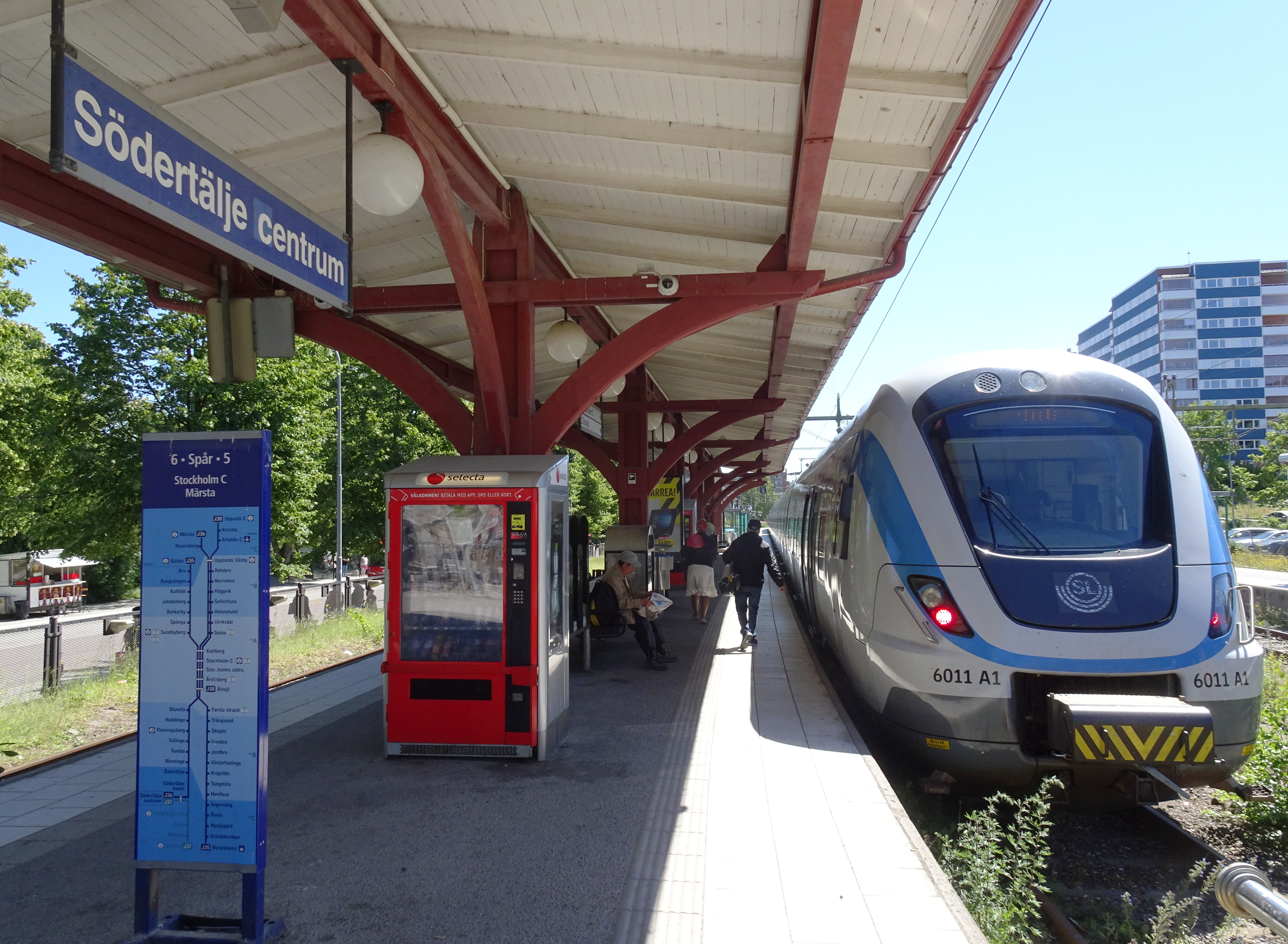 Södertälje Centrum, perongen